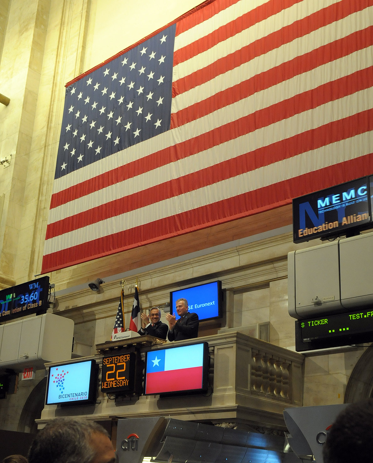 Presidente Piñera inauguró Día de Chile en la Bolsa de Nueva York